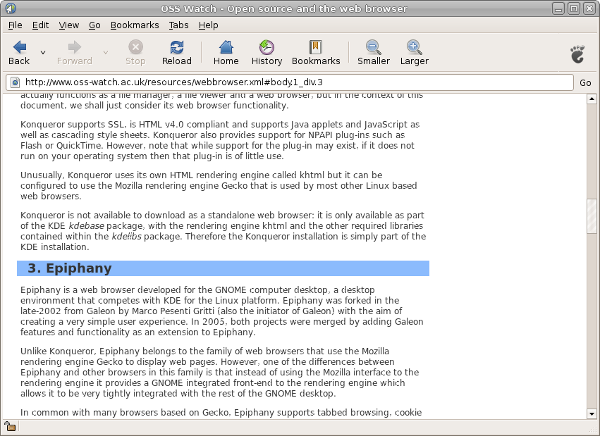 Epiphany 2.20.1 running on Ubuntu